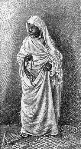 Un marabout (illustration de Côte occidentale d'Afrique, du Colonel Frey, Fig.87 p. 136)